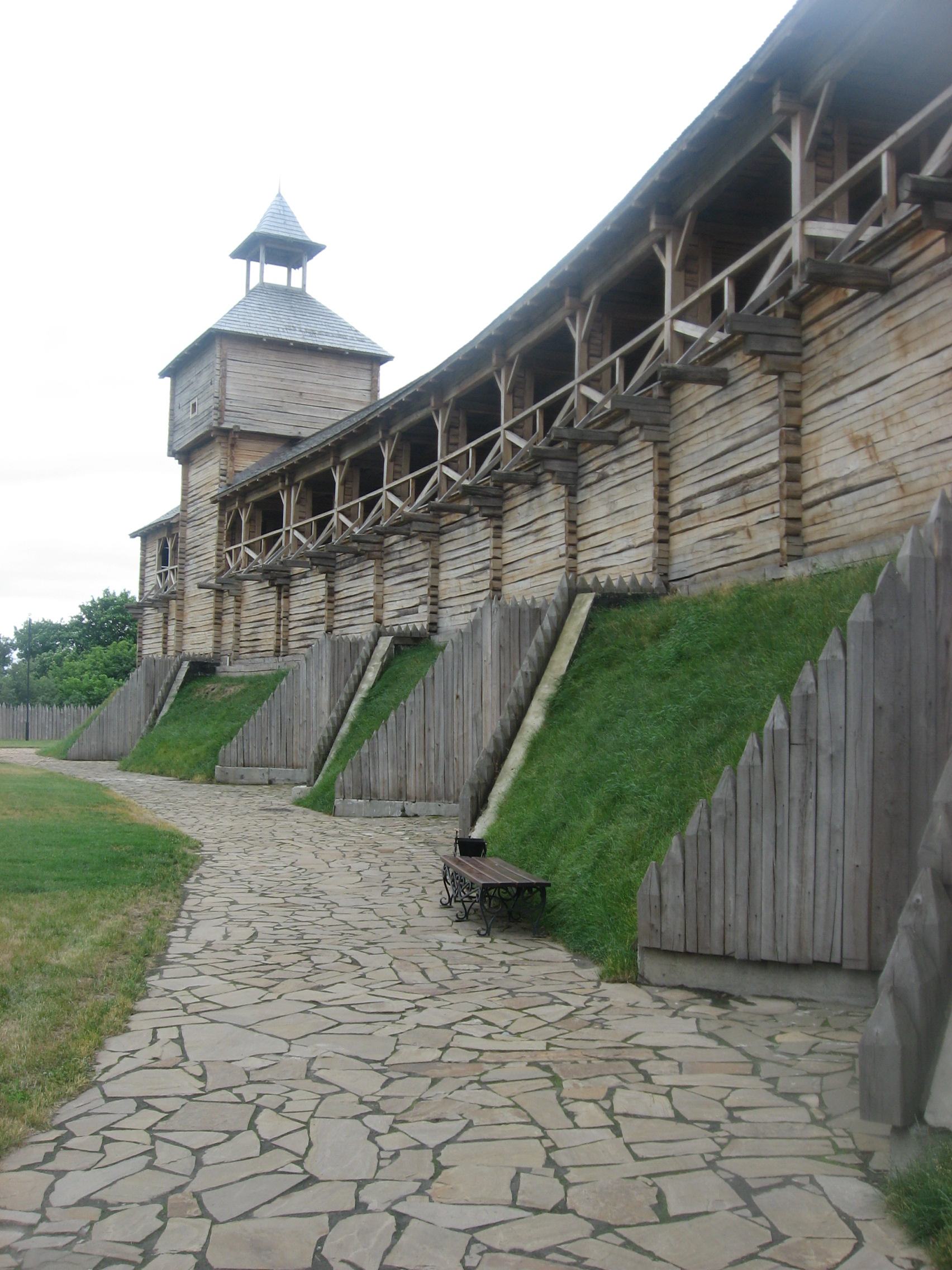 Батуринська фортеця